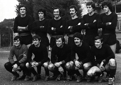 La Narnese 2° classificata nel campionato di 1° Categoria Umbra 1973-74 - In alto da sin.: Russo, Grillini, Giordano, Cardinali, Di Leonardo, Del Monaco. In basso da sin.: Tommasi, D’Anna, Sofferenti, Proietti, Moretti.